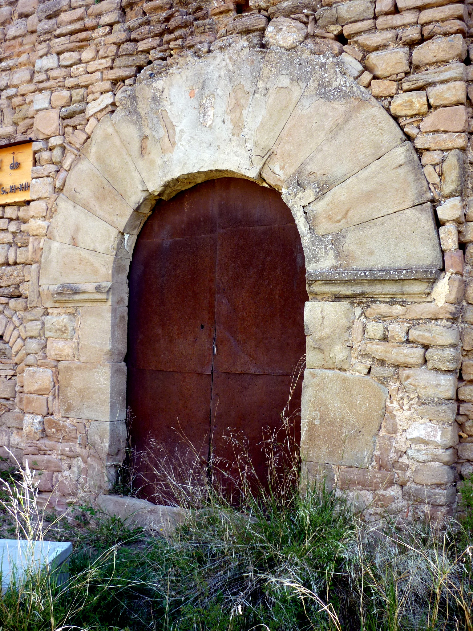 Església de Sant Jaume de Sant Cristòfol (la Baronia de Rialb): portalada